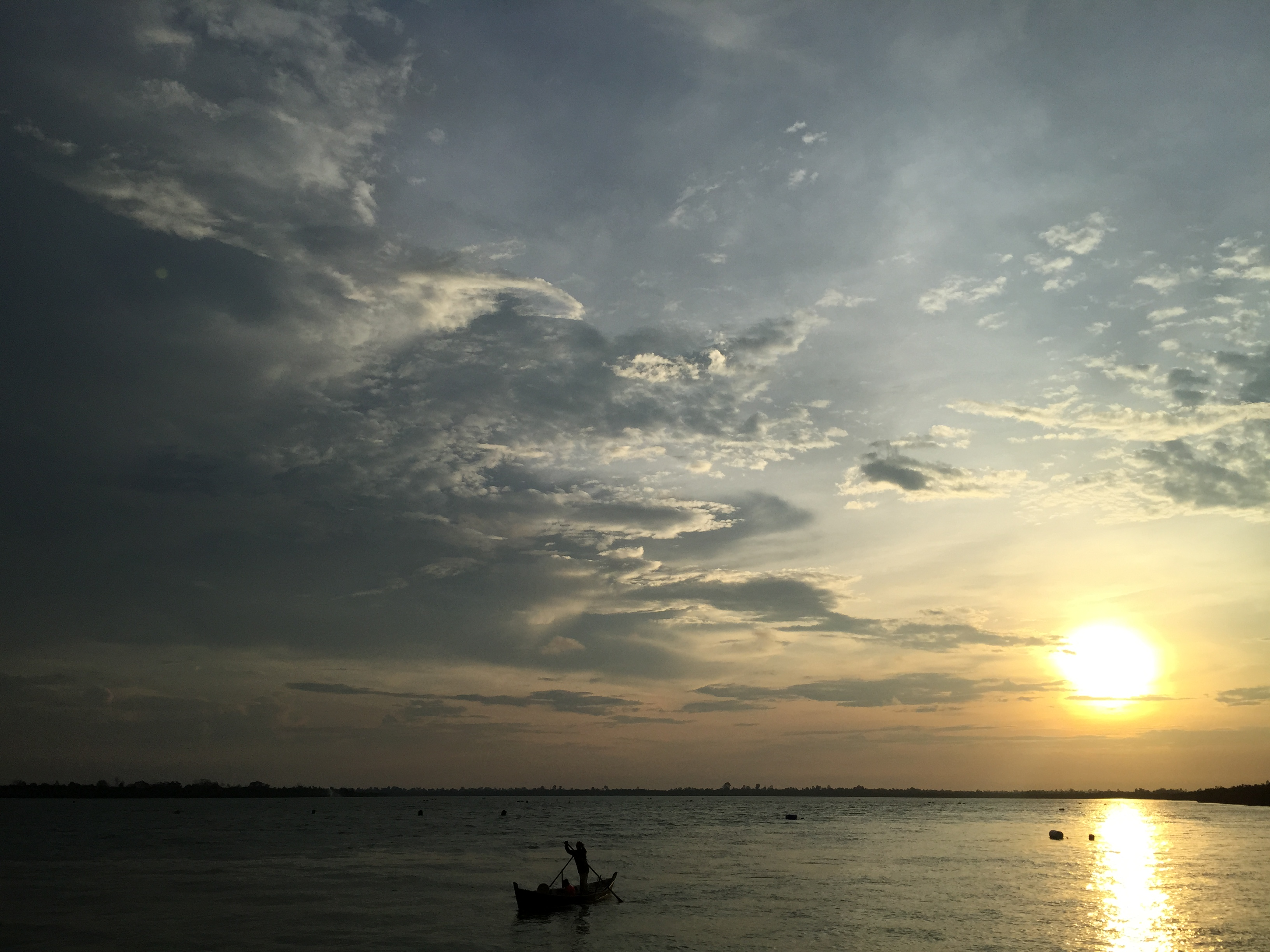 Pemandangan laut senja di Kabupaten Kepulauan Meranti, Kecamatan Merbau, Desa Meranti Bunting. Terlihat nelayan hendak kembali ke dermaga sehabis merawai (menjaring ikan), merawai menjadi mata pencaharian utama warga desa Meranti Bunting, hal ini dikarenakan letak desa yang berada diujung Pulau Padang dekat dengan laut.